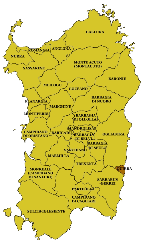 Sardinian Subregions